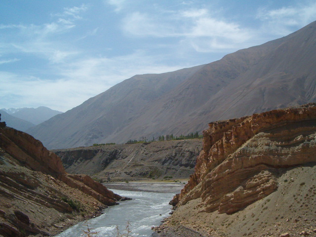 Ayni, Zarafshon River, Tajikistan